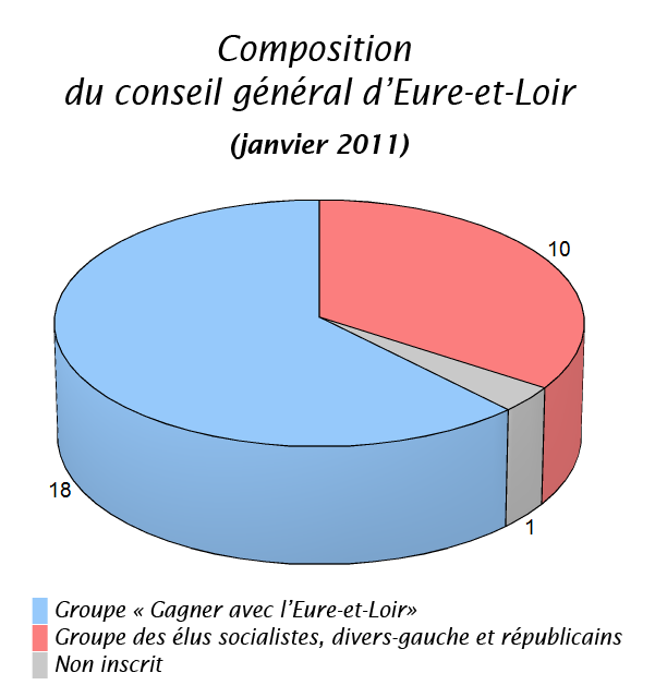 Composition du conseil général d'Eure-et-Loir (janvier 2011)